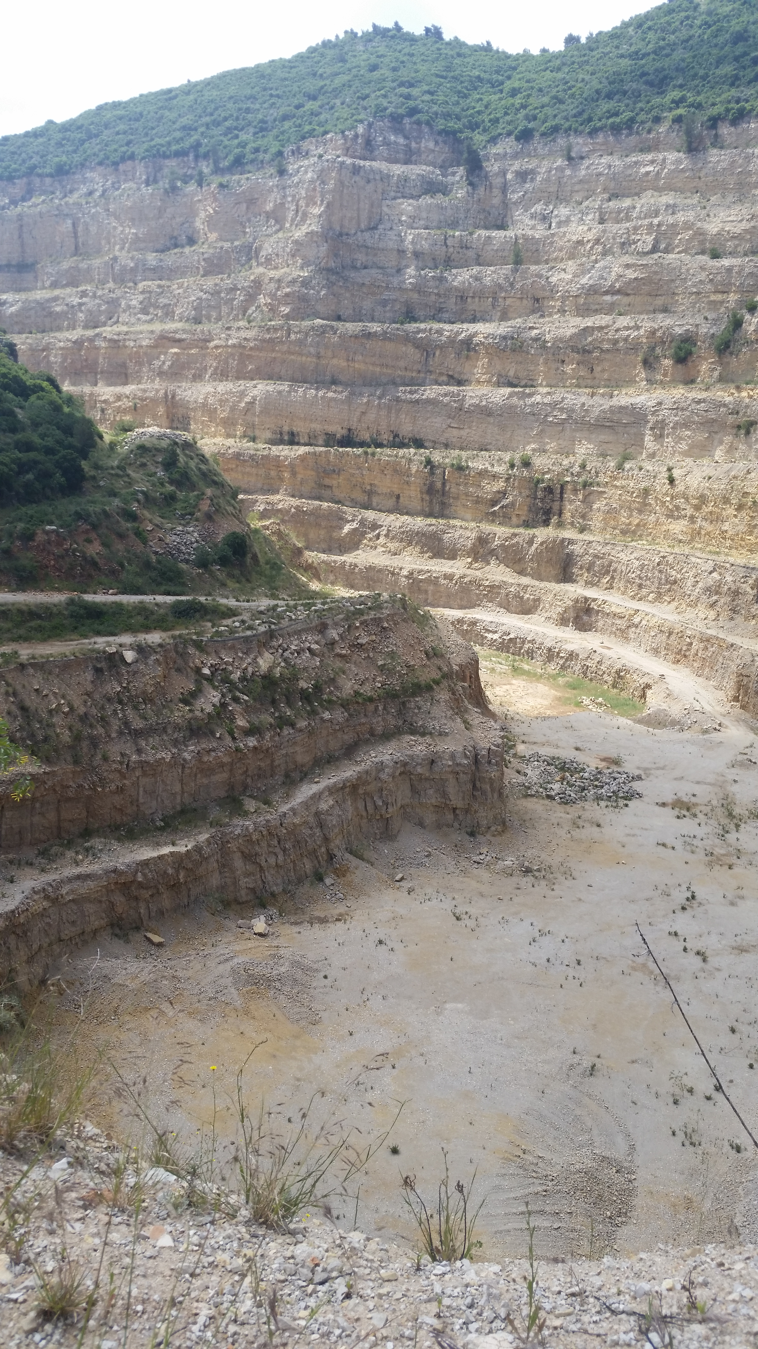 המחצבה בנחל נשר נפתחה בשנות השישים של המאה העשרים וננטשה בעשור הראשון של המאה ה-21